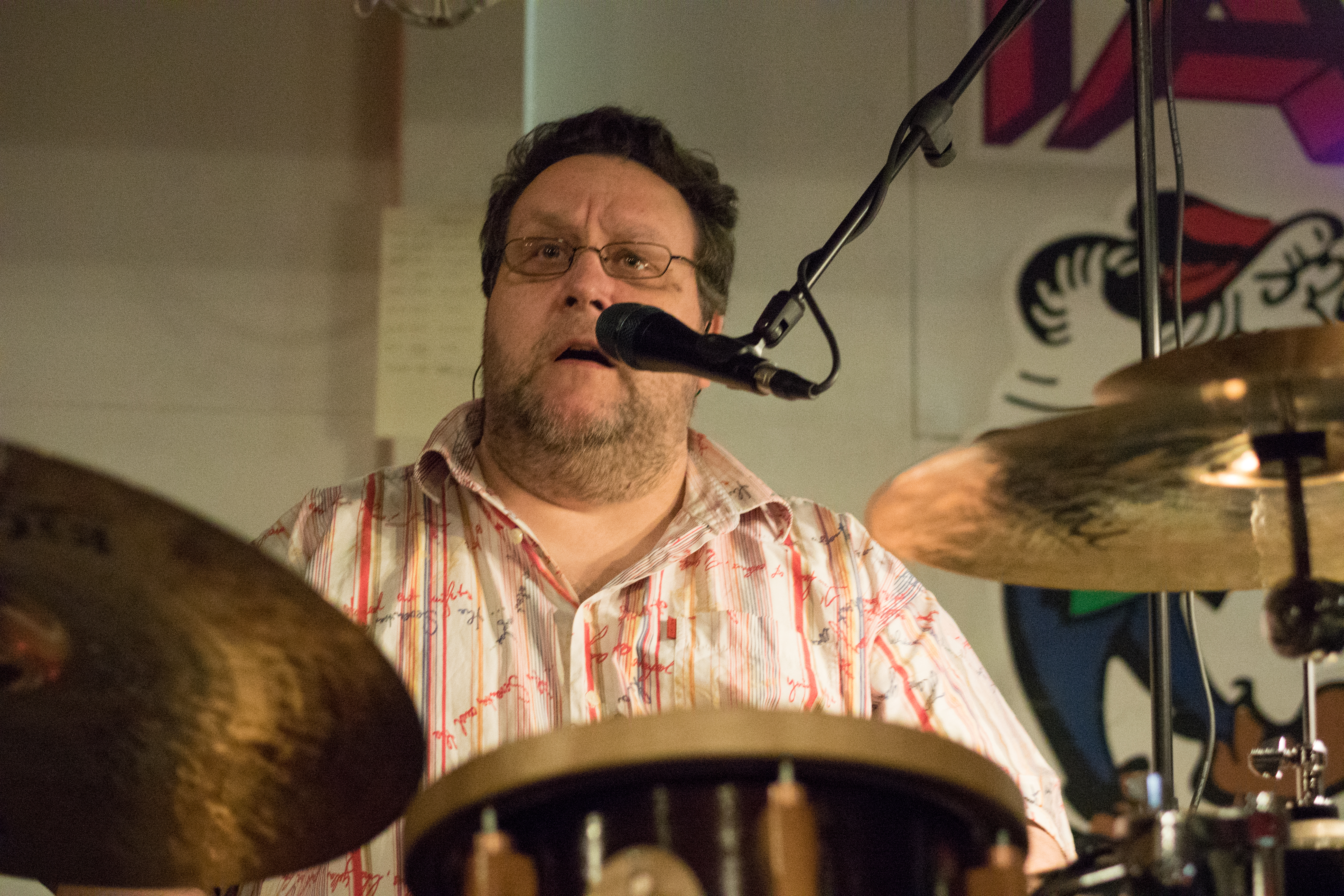 Jake Niska suomalainen rumpali